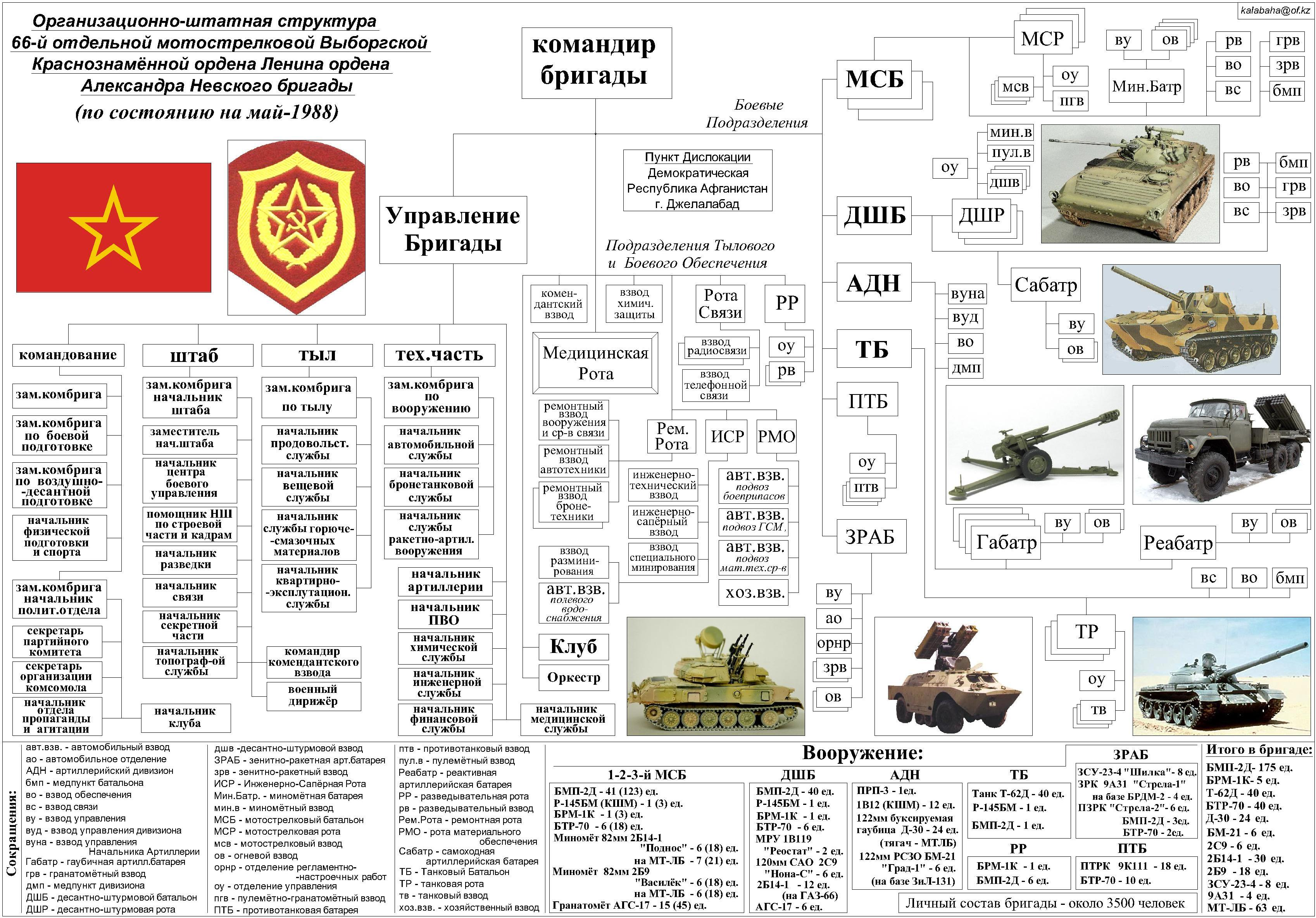 Организационно-штатная структура 66-й омсбр на май-1988. Собственная работа на основе данных, взятых у Бешкарева Александра Ивановича в статье "Афганистан. 66 омсбр" на сайте , и данных, взятых на сайте 66-й омсбр - . Отчерчено в AutoCAD 2005